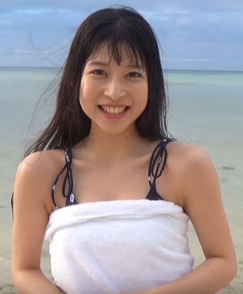 染野有来です。